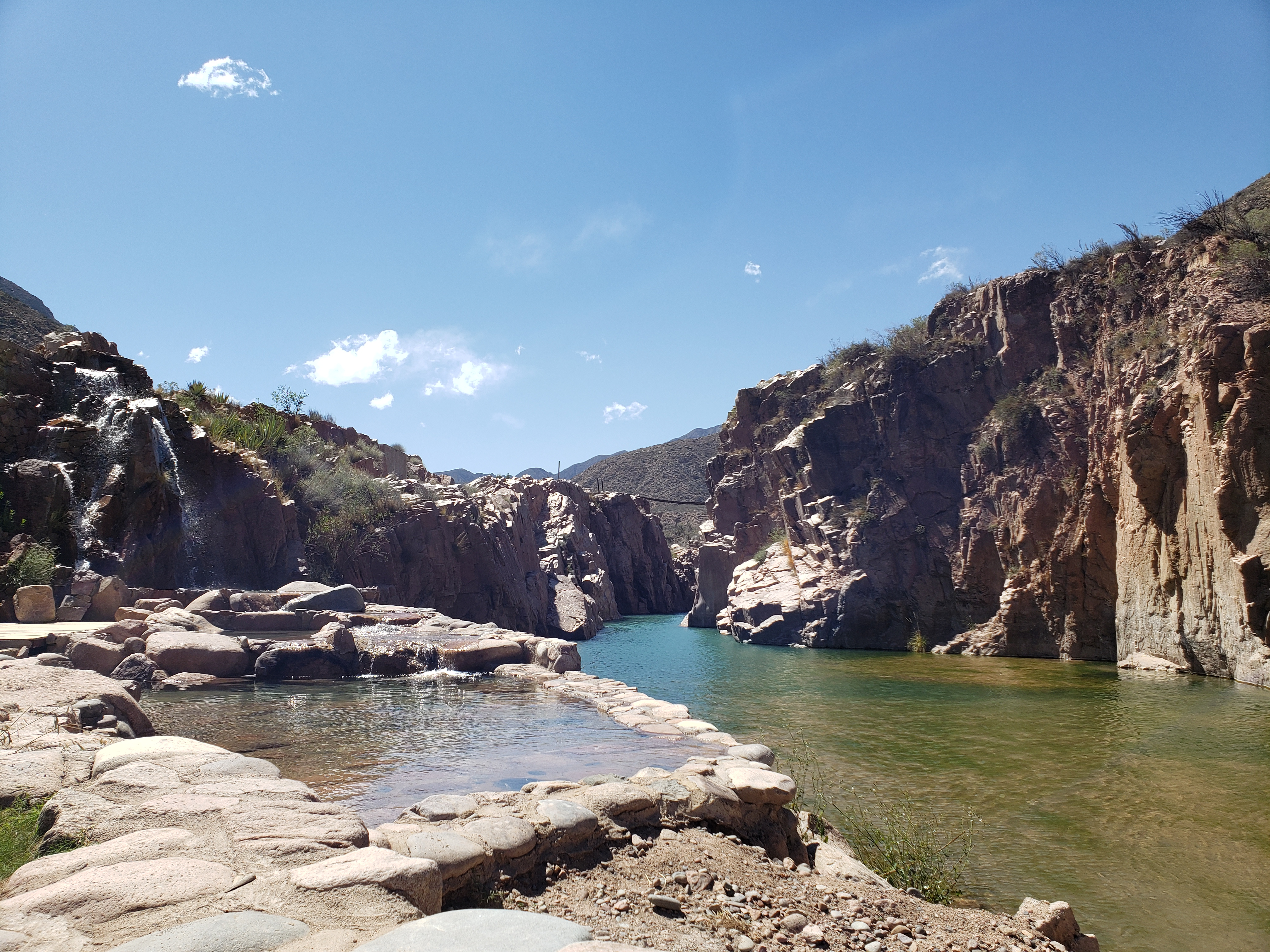 Termas de Cacheuta junto al rio Mendoza